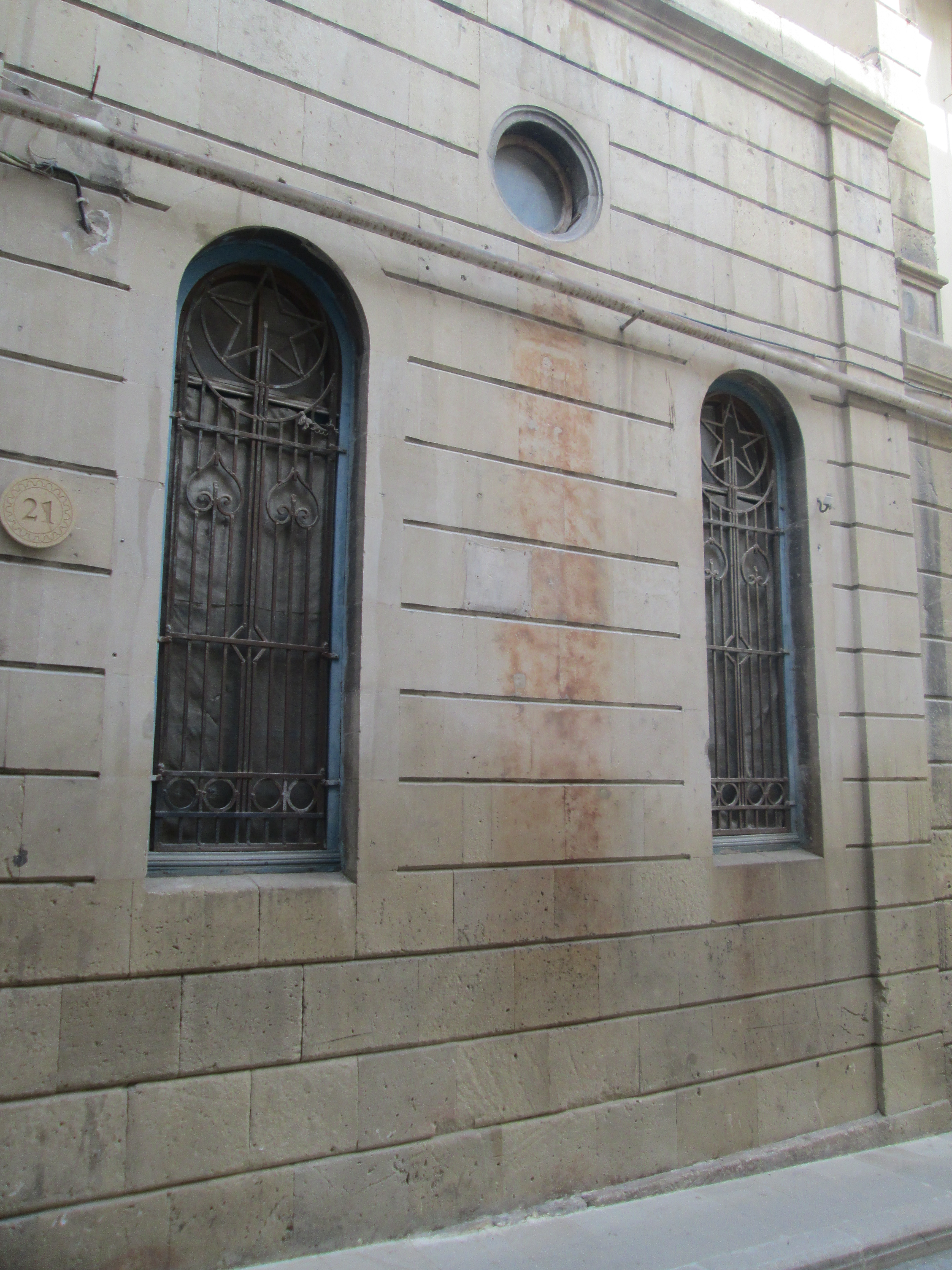 Xanlar məscidi